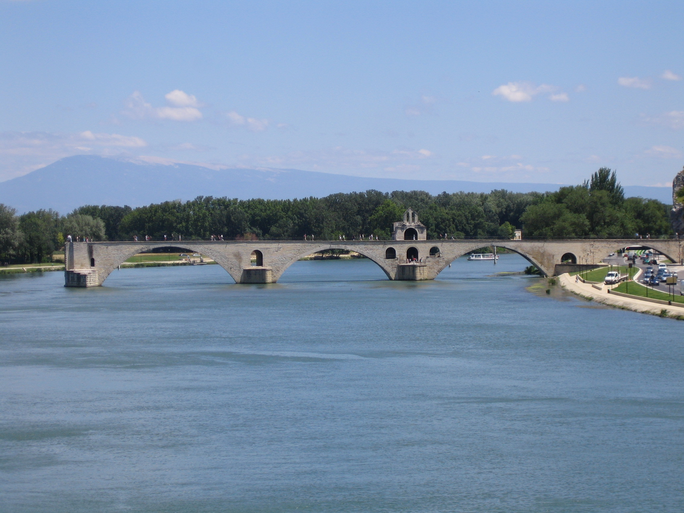 Pont d'Avignon, Vaucluse, France sur le Rhône. Au fond, le Mont Ventoux.